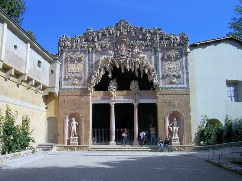 La grotta grande, Giardino dei Boboli, Firenze, Italy.